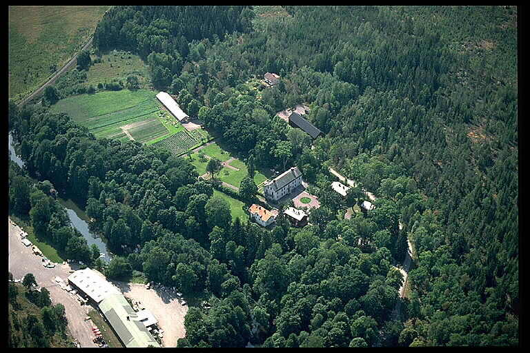 Alsters herrgård i bildens mitt. Motiv: Alster Nyckelord: Byggnadsminnen, Flygbilder, Riksintressen Kategori: Herrgårds-/slottslandskap Alsters herrgård i bildens mitt.